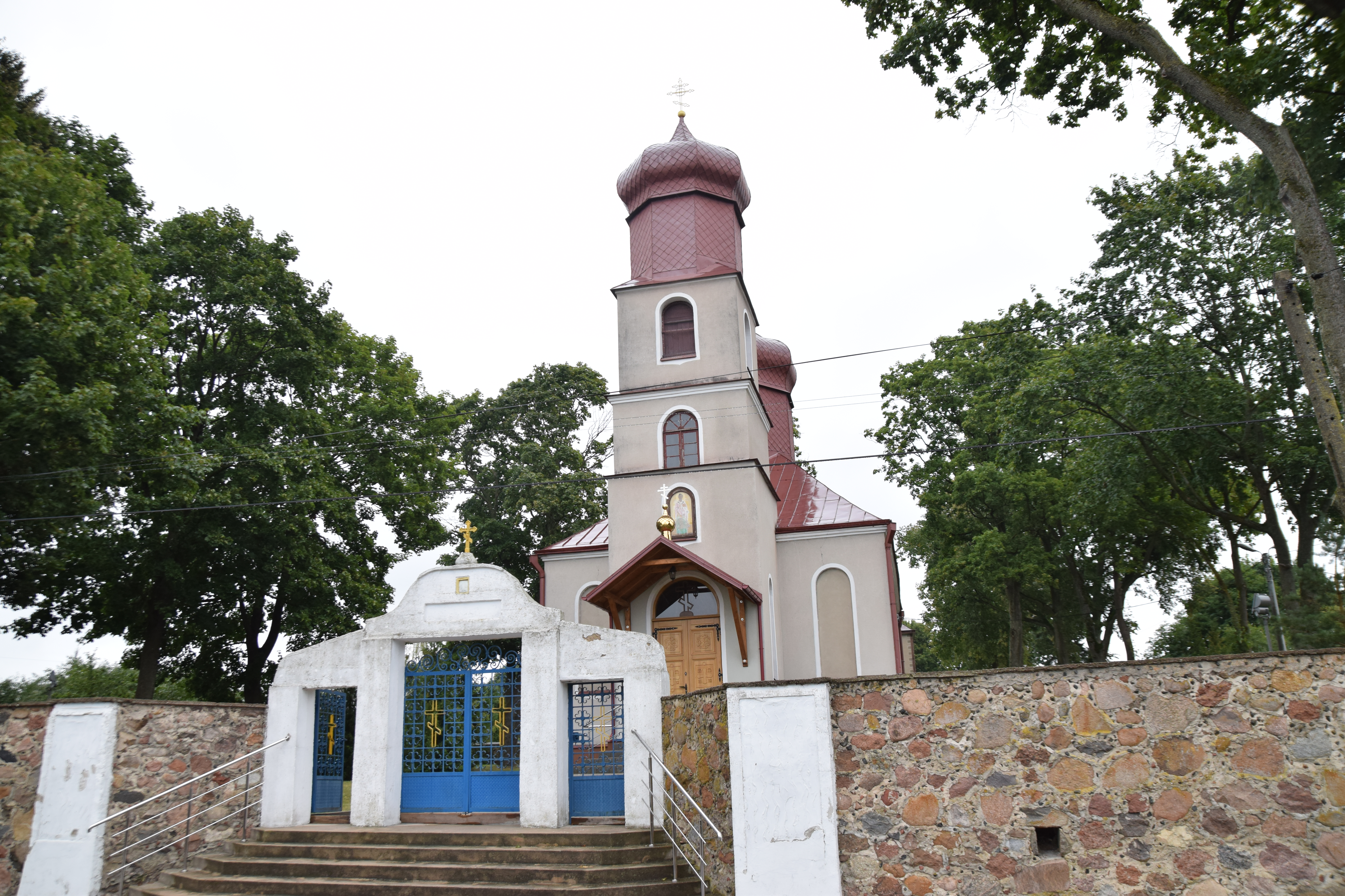 Cerkiew w Nowym Dworze w czasie deszczu